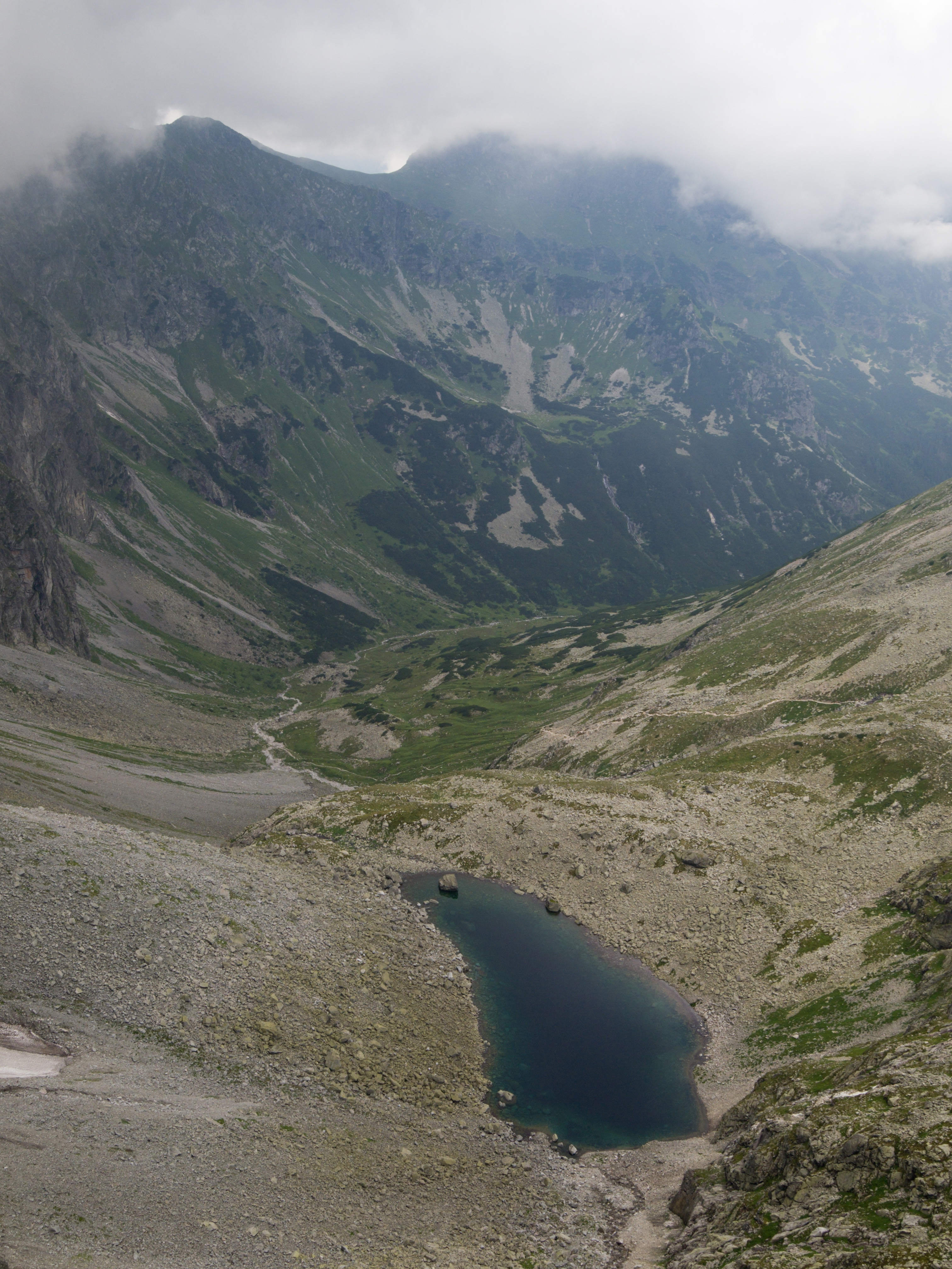 Dolina Zadnia Jaworowa i Żabi Staw Jaworowy